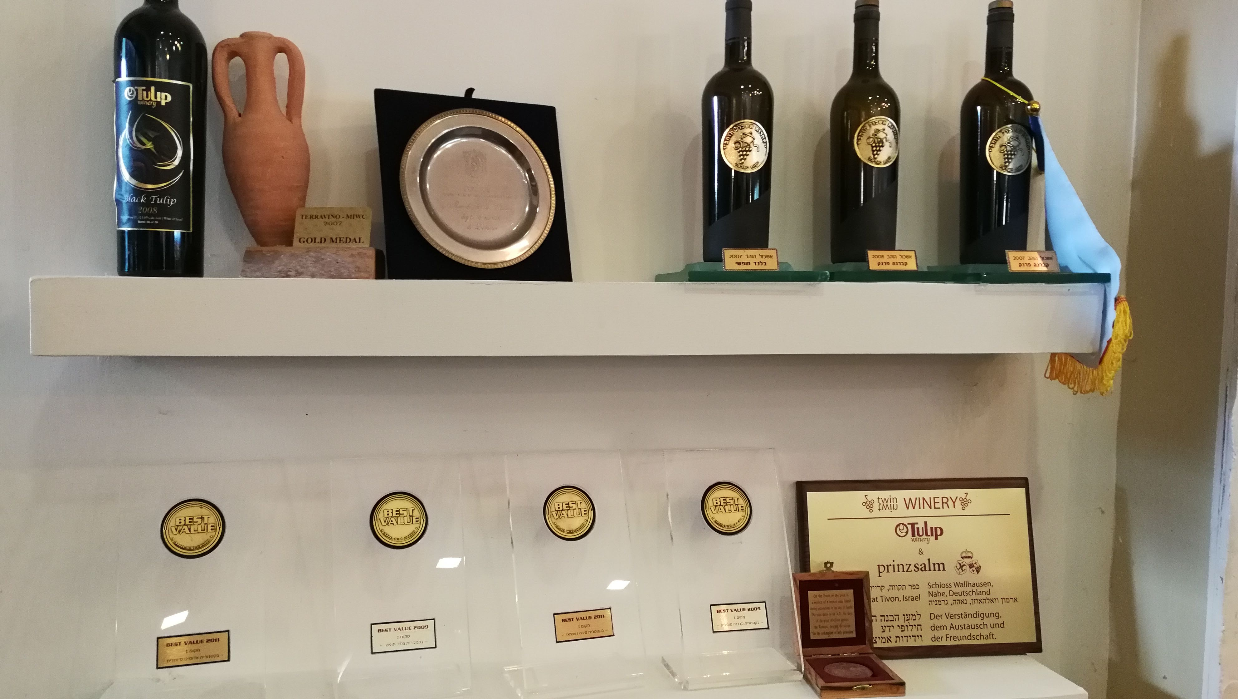 פרסים במרכז המבקרים של יקב טוליפ, כפר תקווה